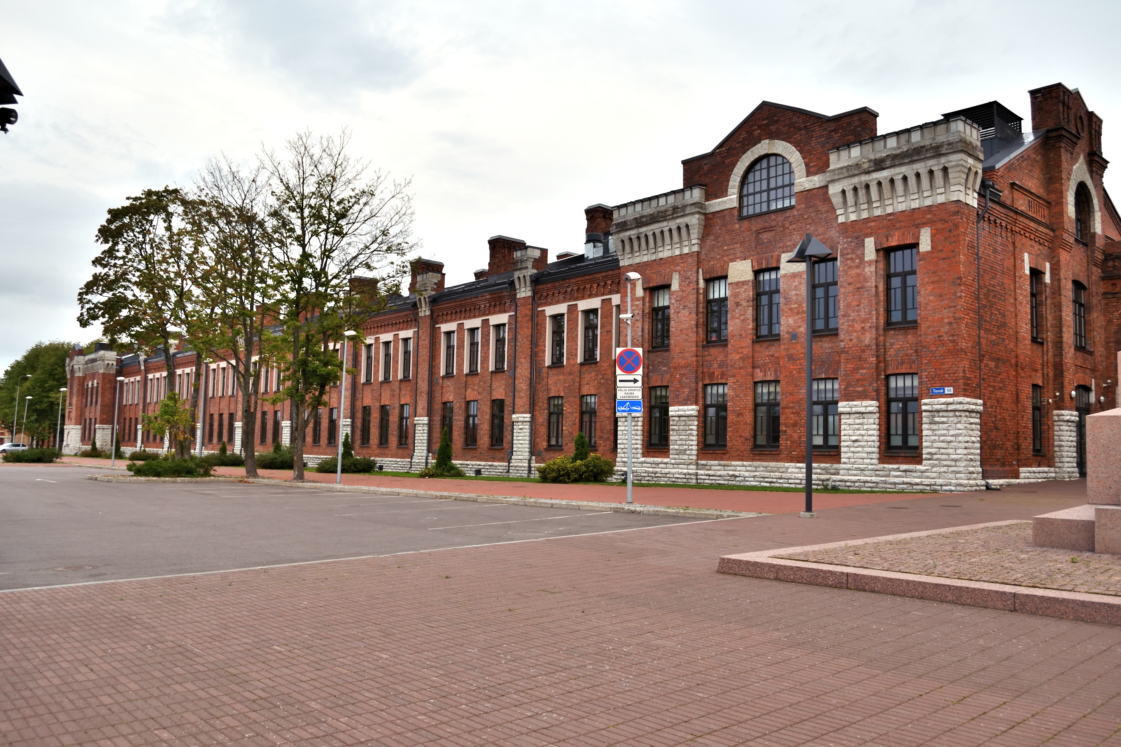 Tondi sõjaväelinnaku kasarm Tondi 55, 57, 1915-1916